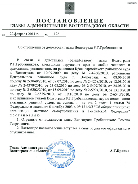 Постановление главы администрации ВОлгоградской области «Об отрешении от должности главы Волгограда Р.Г. Гребенникова» от 22 февраля 2011 года № 126